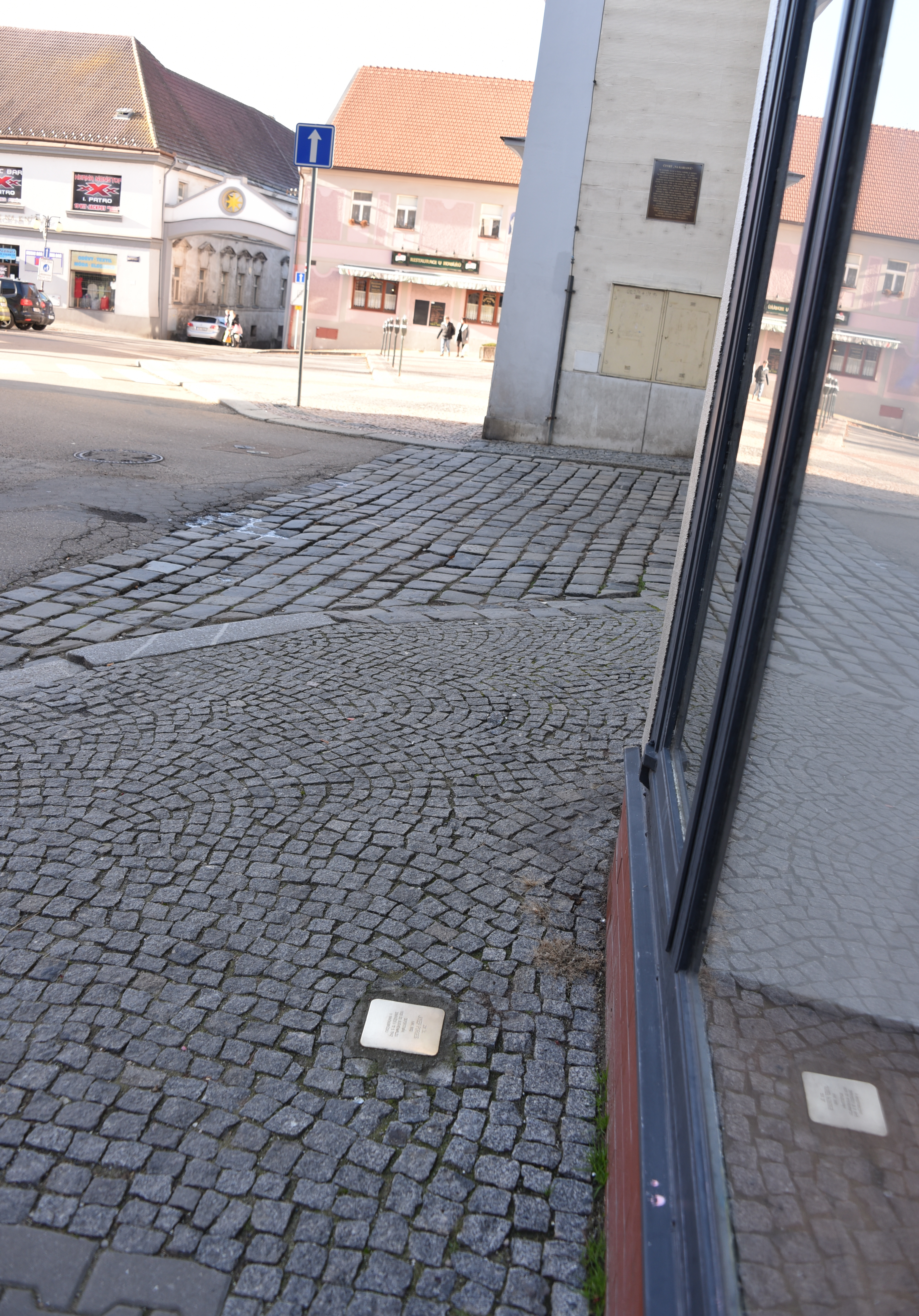 Gedenkstein in Benešov für Josef Porges, Na Karlově 77